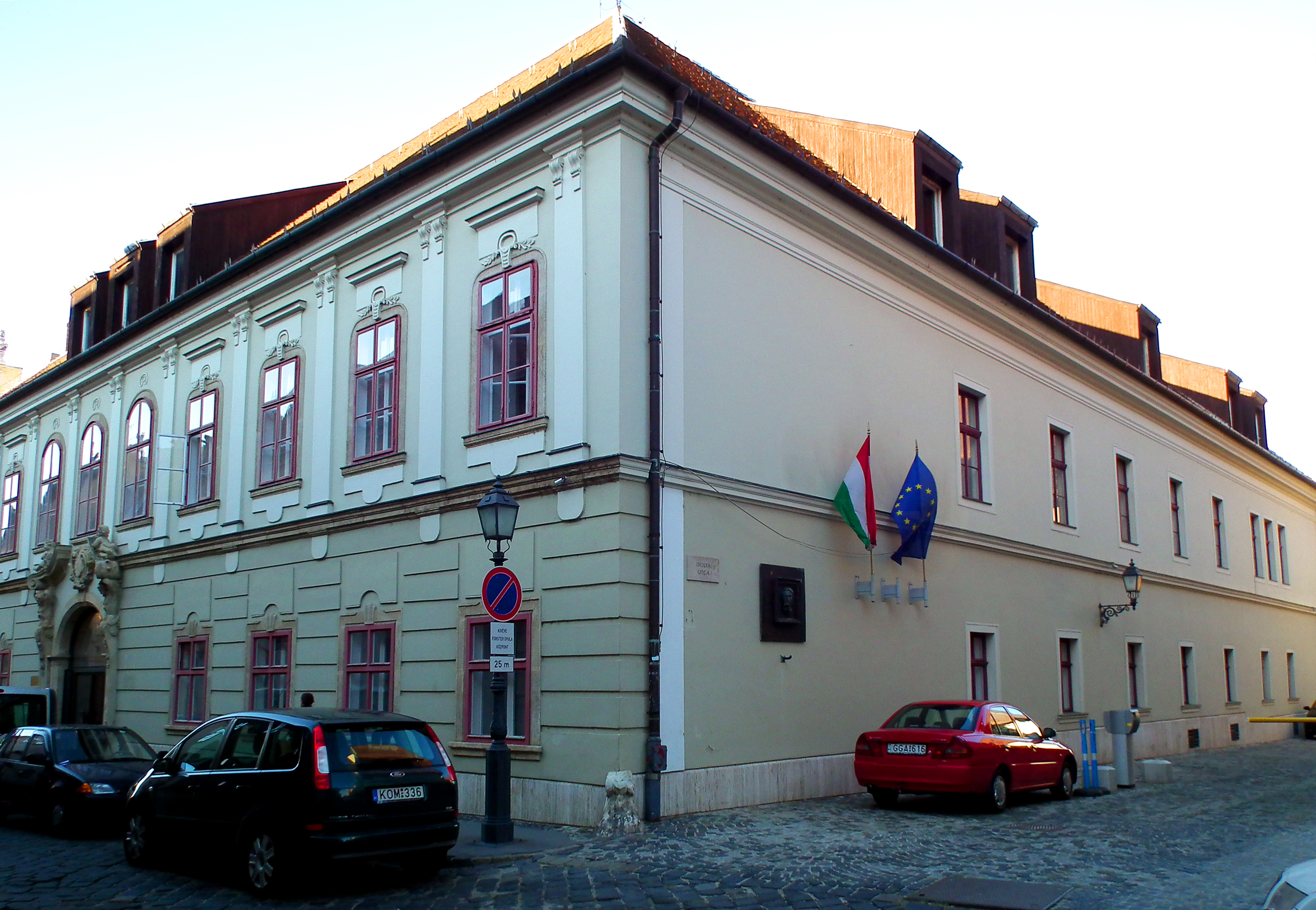 lakóház, Forster Gyula központ, Budapest I., Táncsics u. 1. This is a photo of a monument in Hungary. Identifier: 152